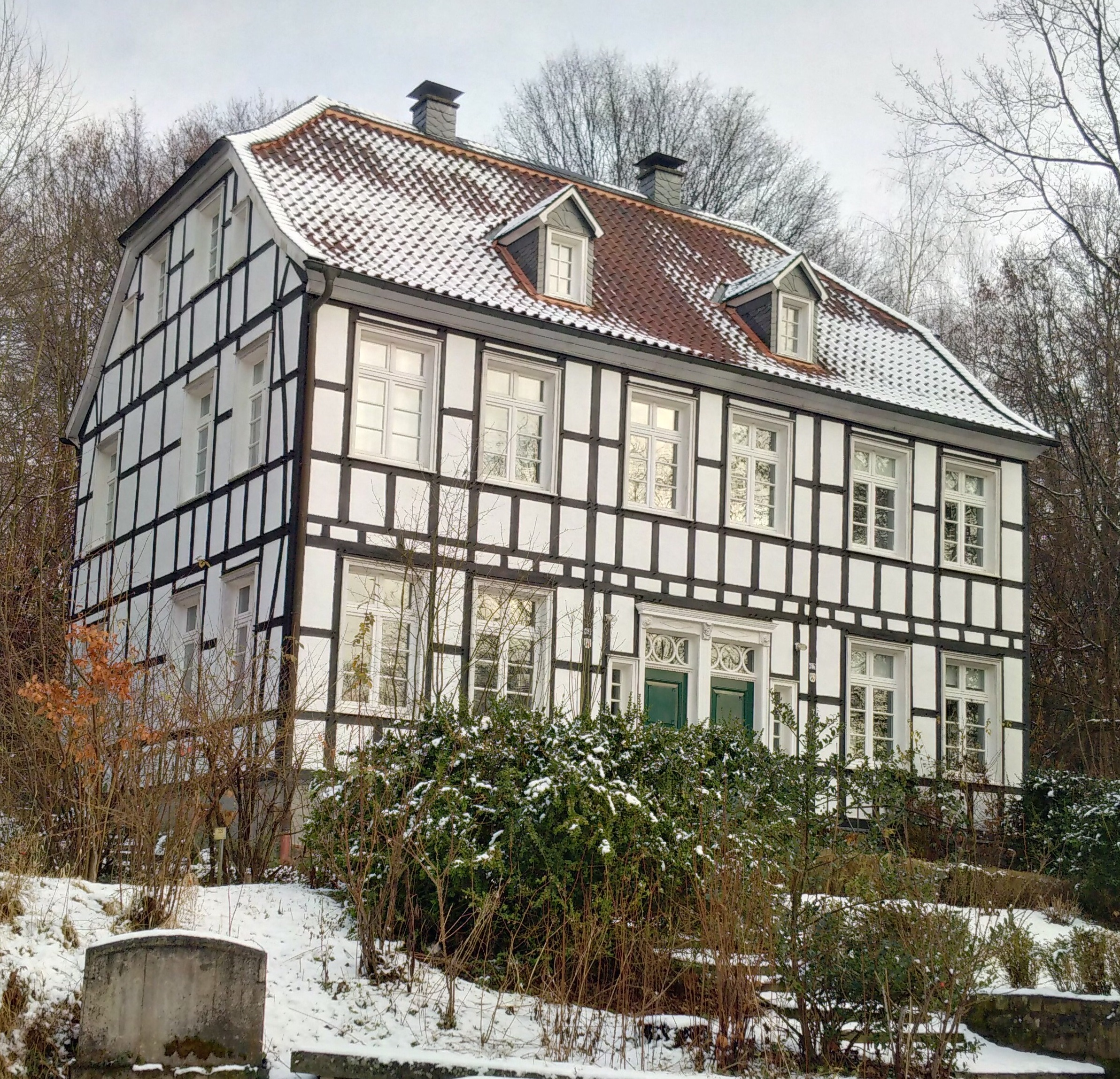 Peter-Knecht-Haus in der Hofschaft Dahl, aufgenommen im Winter 2016/2017